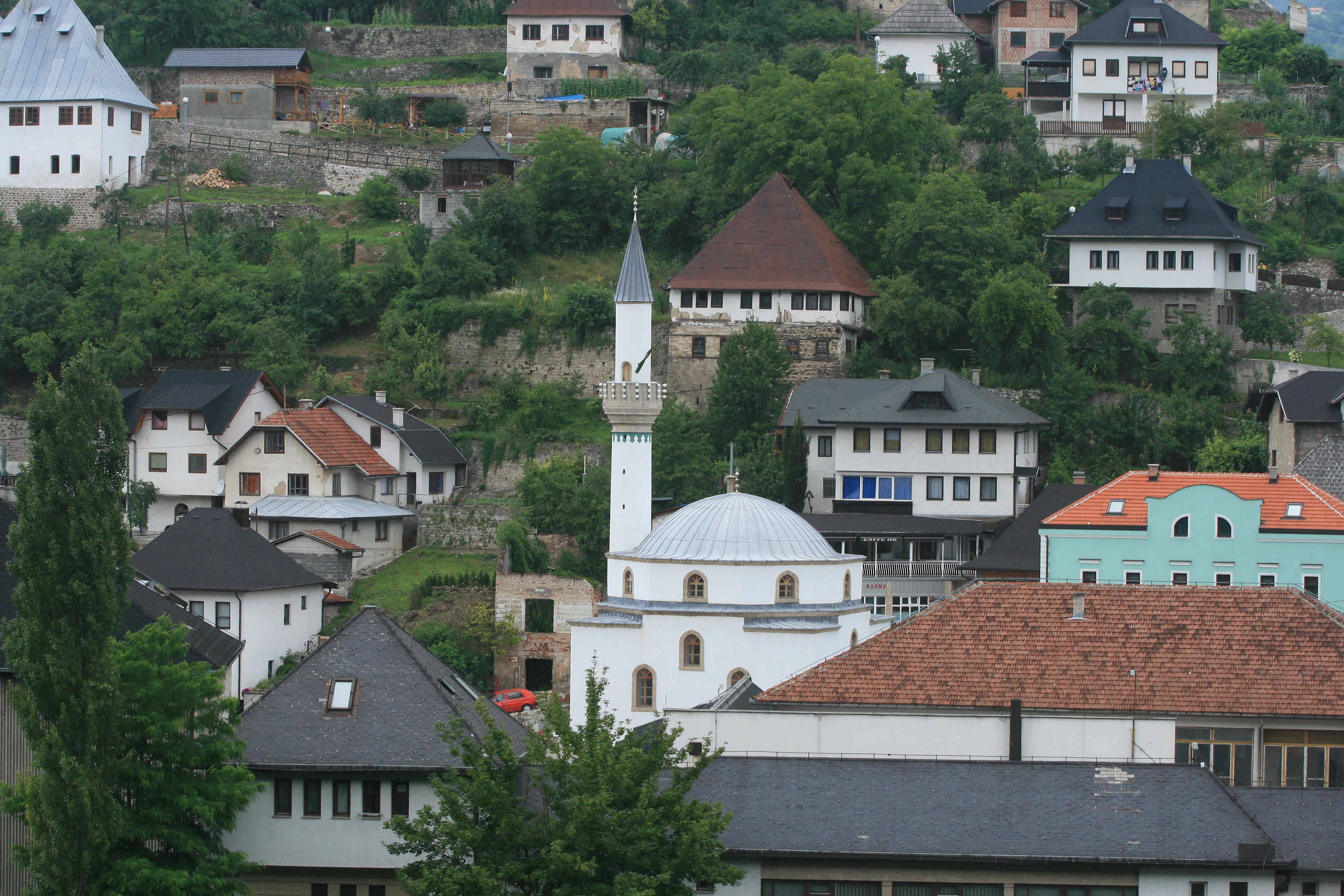 Jajce, Bosnia and Herzegovina